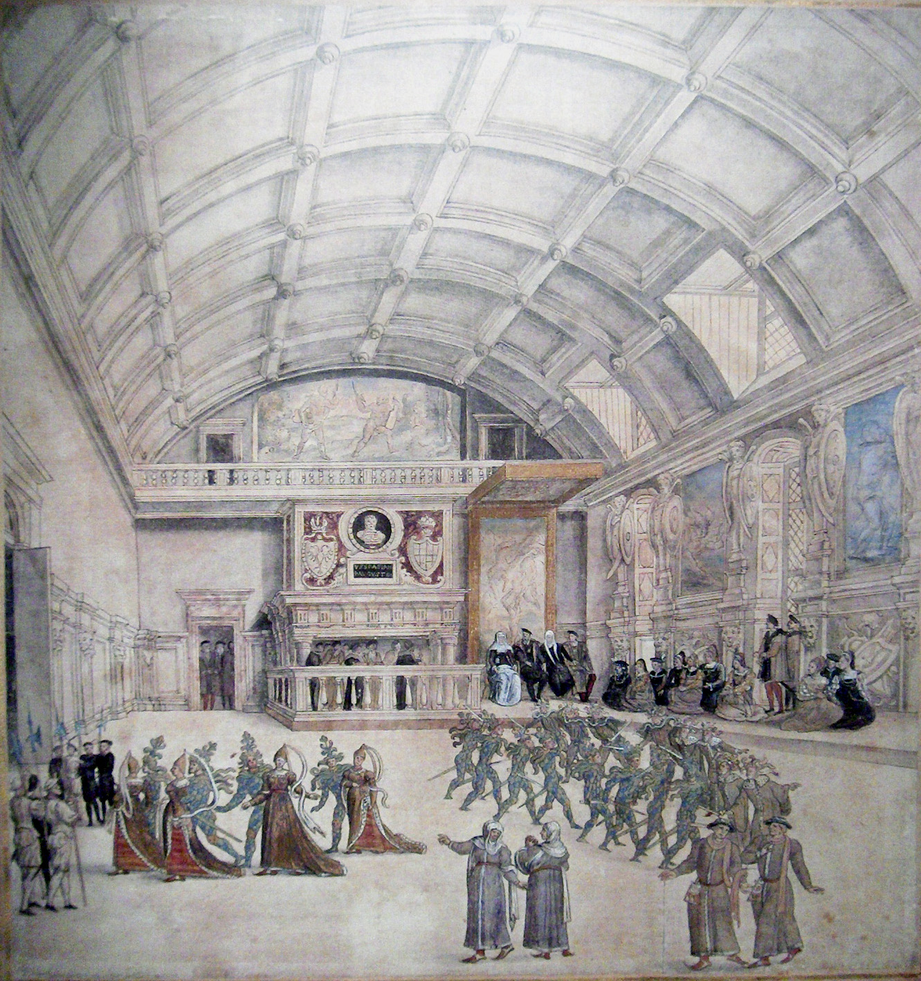 Mary of Austria (1505-1558) receiving Charles V, Holy Roman Emperor at her castle in Binche. This is probably the only remaining image of this castle, as the castle was later destroyed by the French army. Drawing by an anonymous artist (16th century)